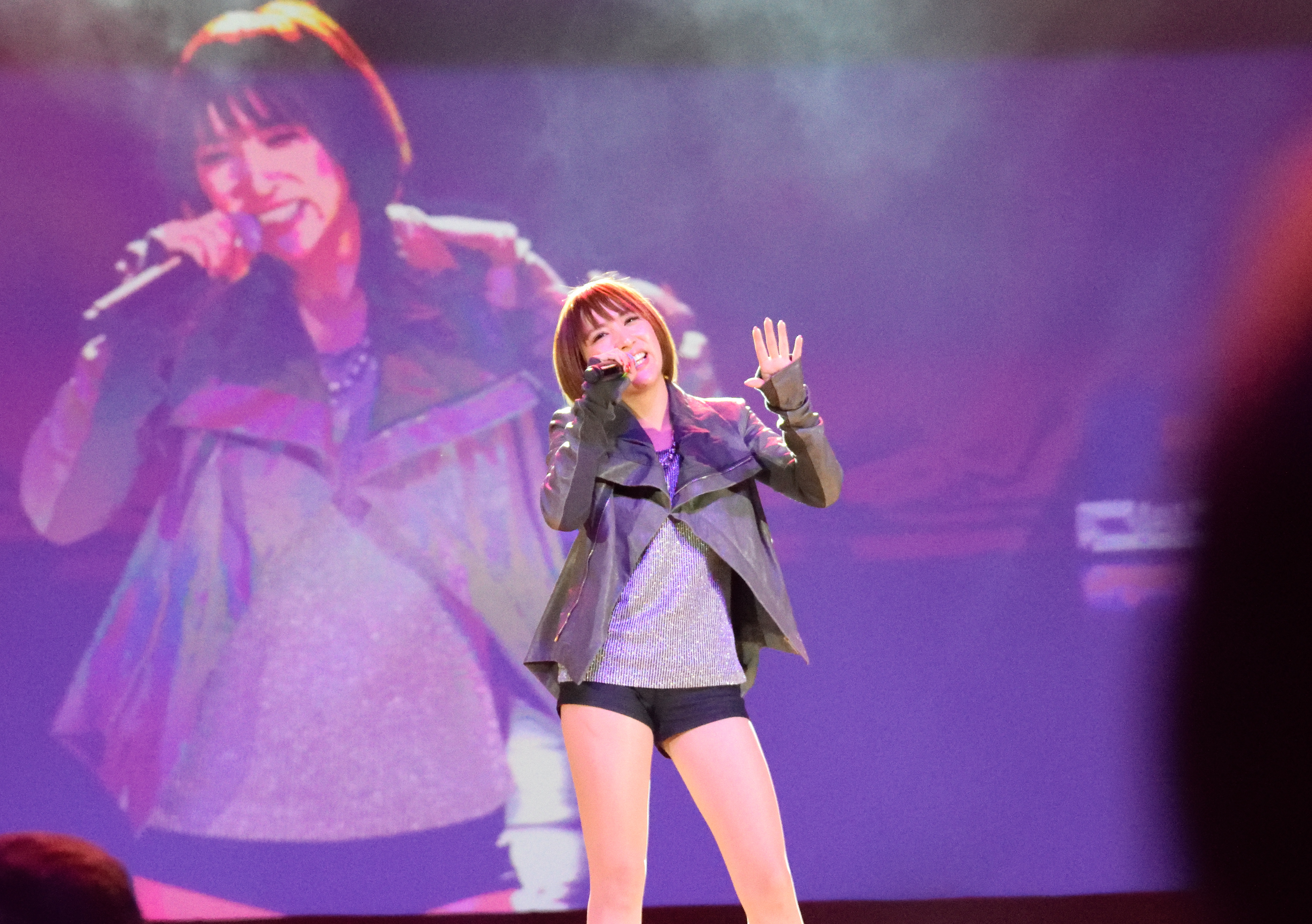 Aoi Eir 3